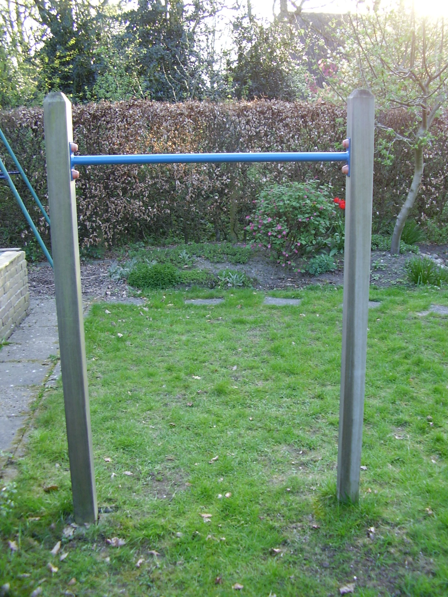 Rekstok